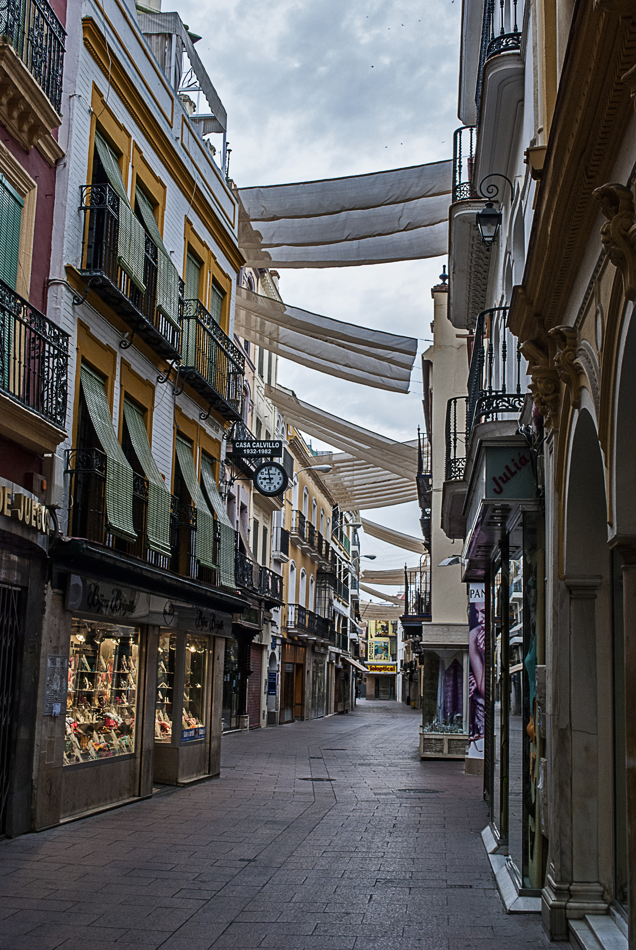 Calle Sierpes de Sevilla desierta en una mañana de domingo del mes de agosto.